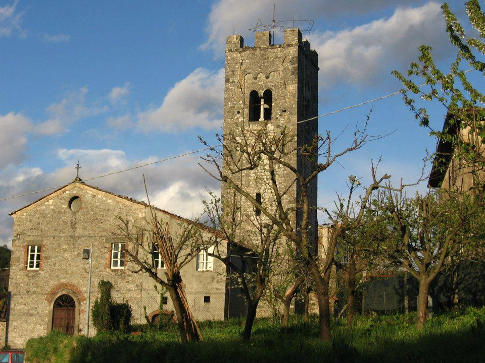 Chiesa di S. Michele di origine romanica (Fondagno, Lucca)